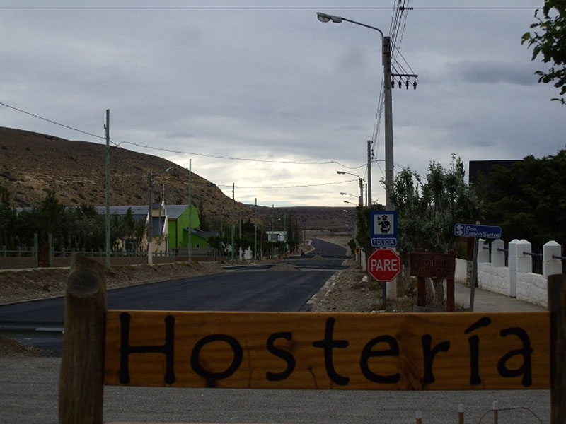 Obras de pavimentación en la Avda. San Martín (Rutas nacionales 40 y 288), a su paso por la población de Tres Lagos (Santa Cruz). Enero de 2015